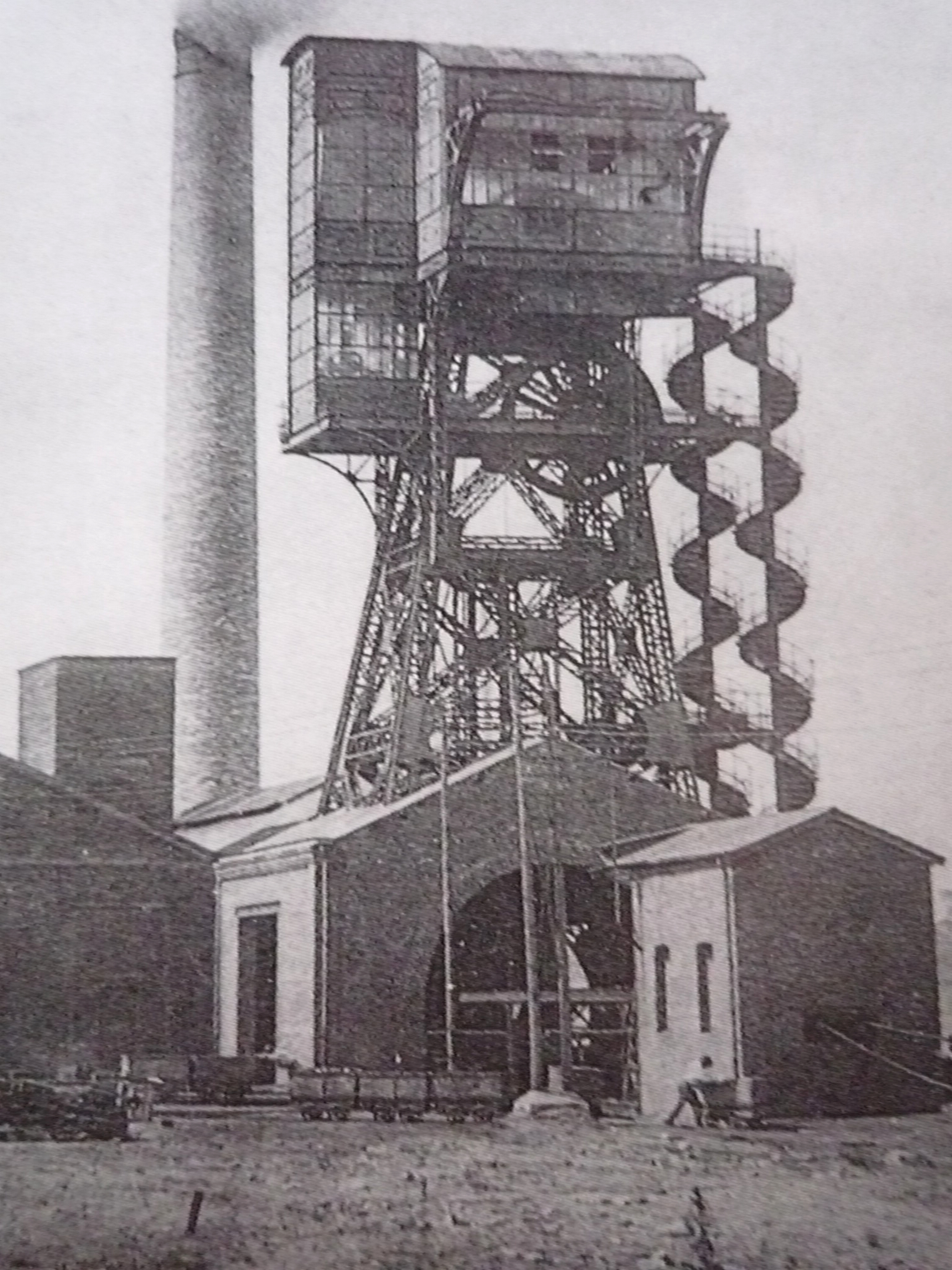 La Fosse n° 2 - 2 bis de la Compagnie des mines de Ligny-lès-Aire était un charbonnage constitué de deux puits situé à Ligny-lès-Aire, Pas-de-Calais, Nord-Pas-de-Calais, France.